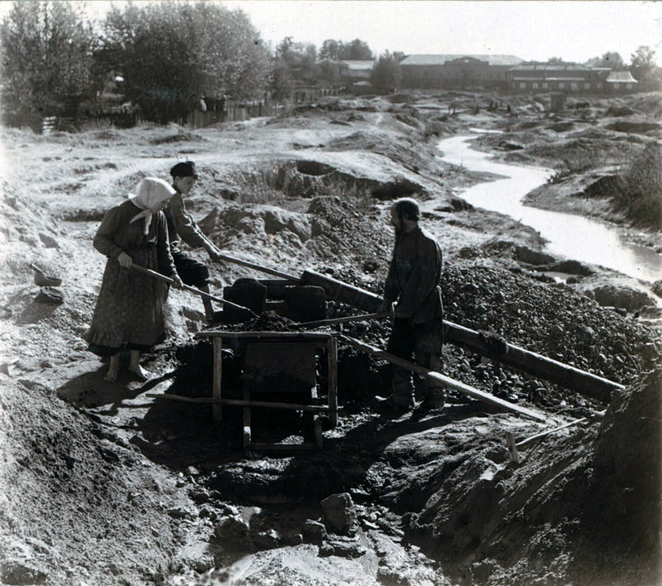 TITLE: Promyvka starateliami zolotonosnago peska. [Berezovski] TITLE TRANSLATION: Miners washing gold-bearing sand. [Berezovski]